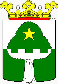 Gemeentewapen Stede Broec